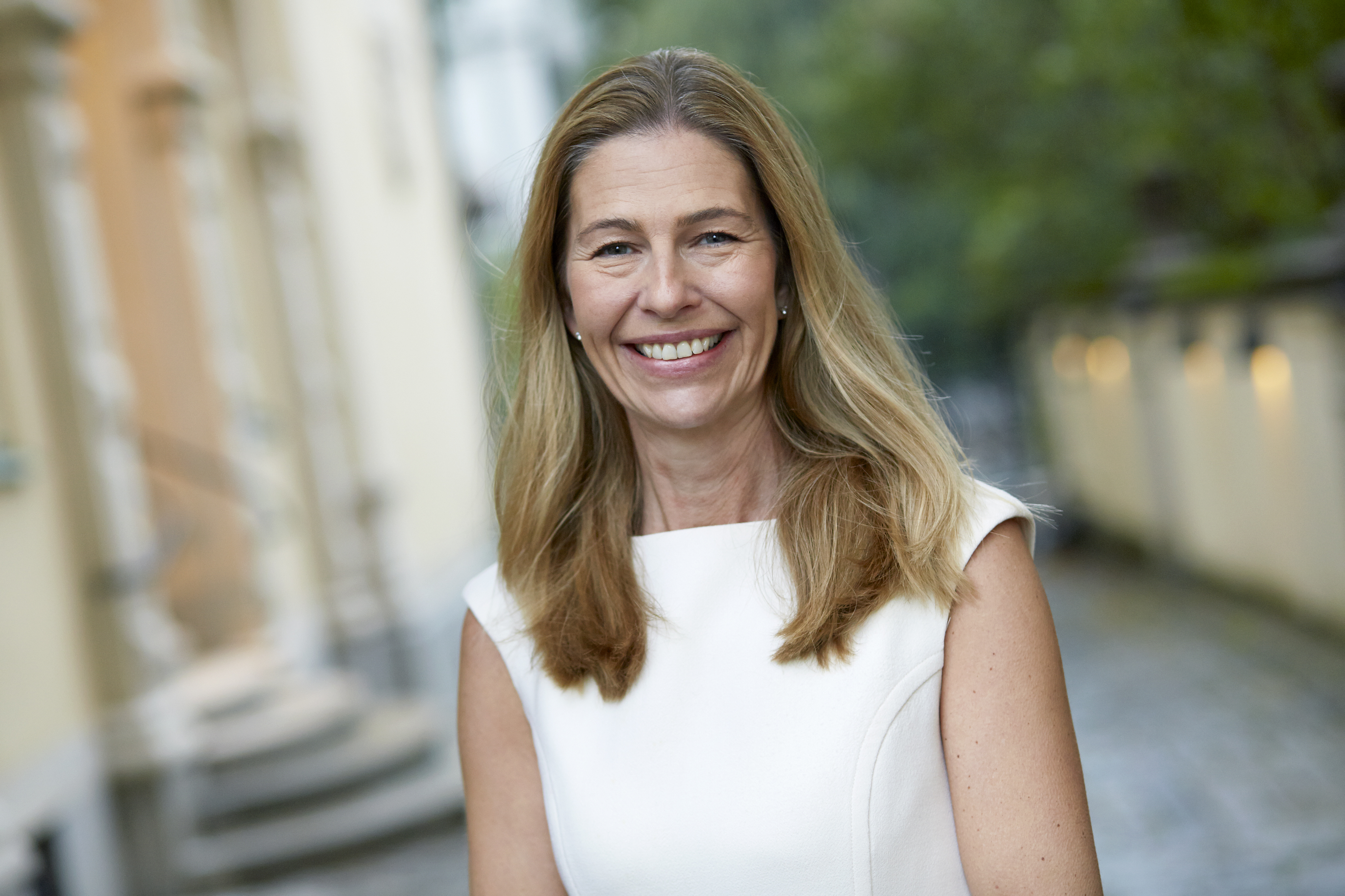 Företagsledaren Mia Brunell Livsfors.